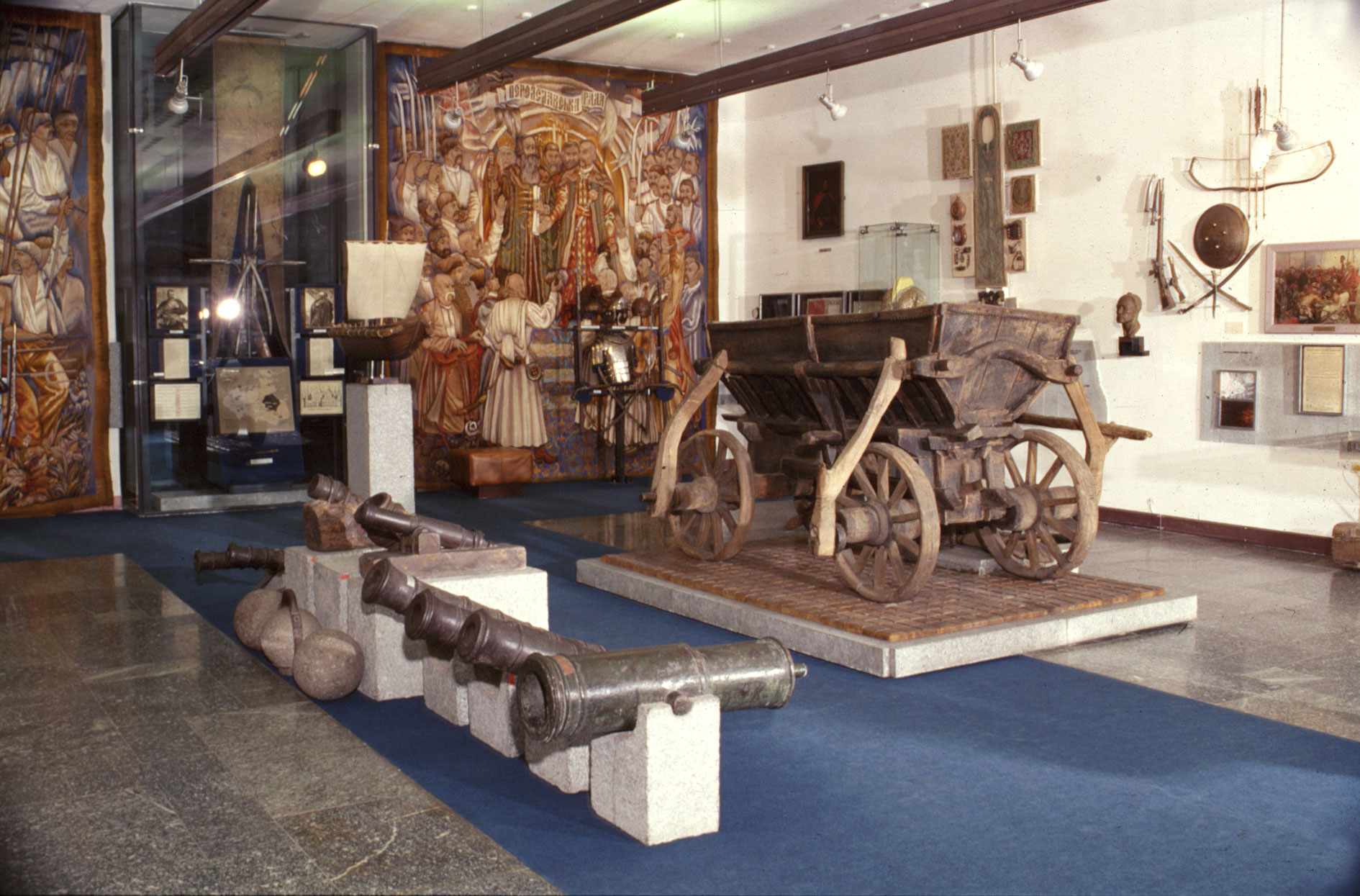 Зала №2. Історія запорозького козацтва